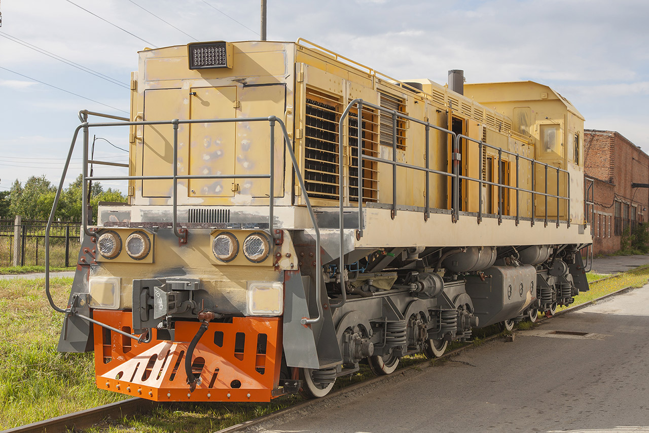 Тепловоз ТЭМ2УГК-8688. Россия, Курганская область, ОАО "Шадринский автоагрегатный завод"